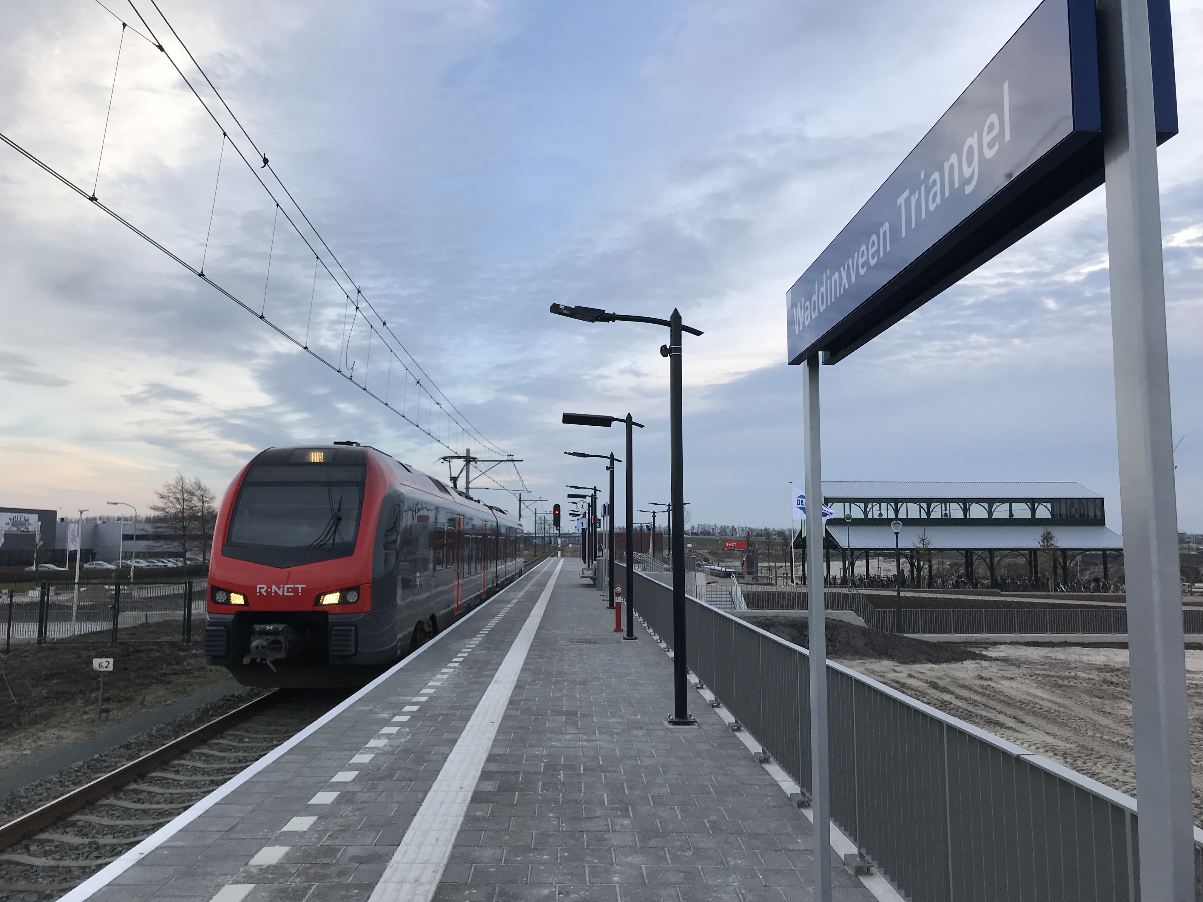 Station Waddinxveen Triangel, Zuid-Holland.